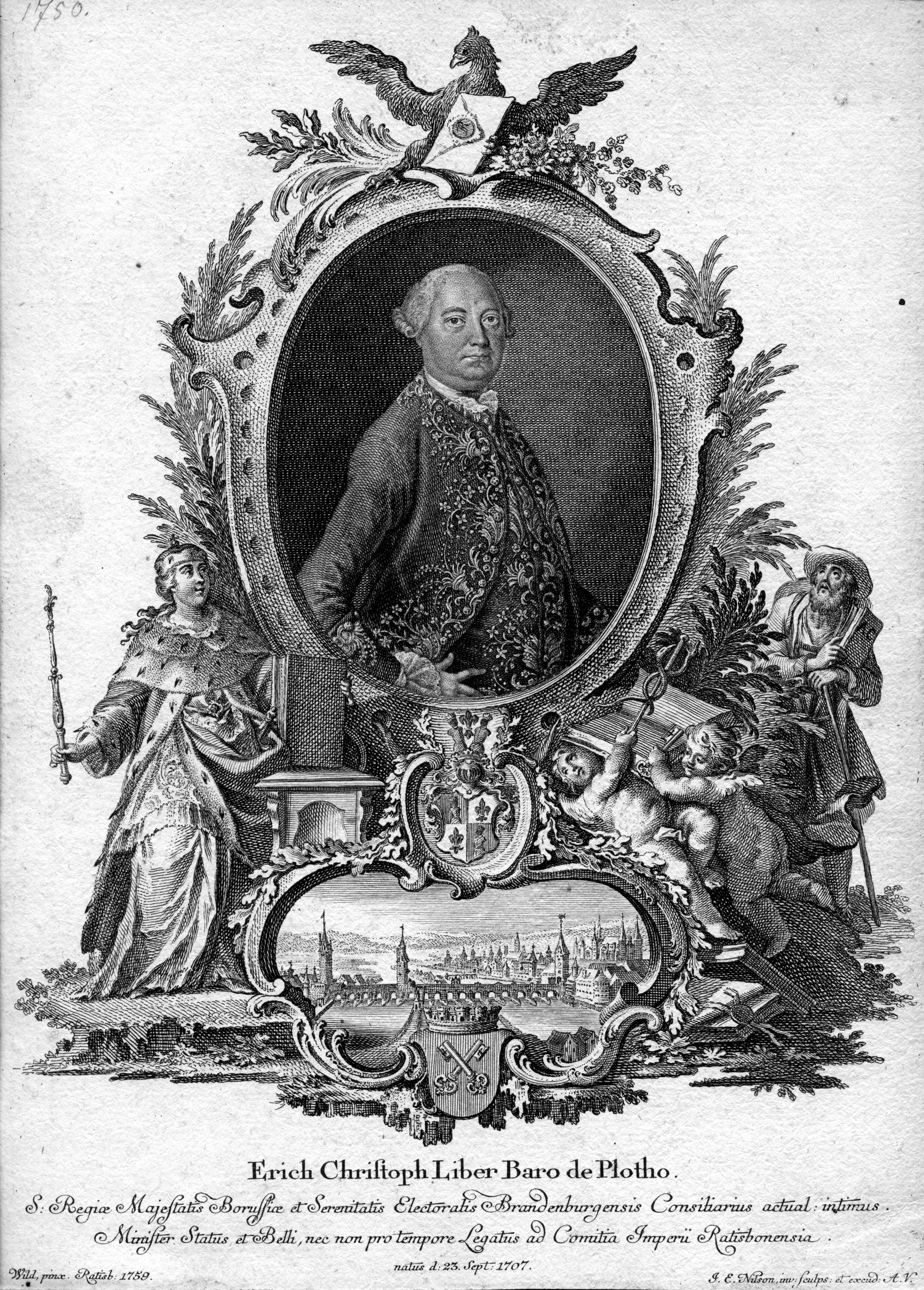 portrait gravé